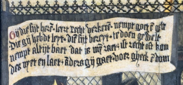 Detail van het Gerechtigheidspaneel of De dubbele gerechtigheid (Jan van Brussel, ca. 1475), voorheen in het Stadhuis van Maastricht, sinds 2018 in het Bonnefantenmuseum. Hier het linkerdeel van het onderste deel met de menselijke gerechtigheid. Afgebeeld is een laat-15e-eeuwse rechtbank met rechts een rijke en een arme aangeklaagde.